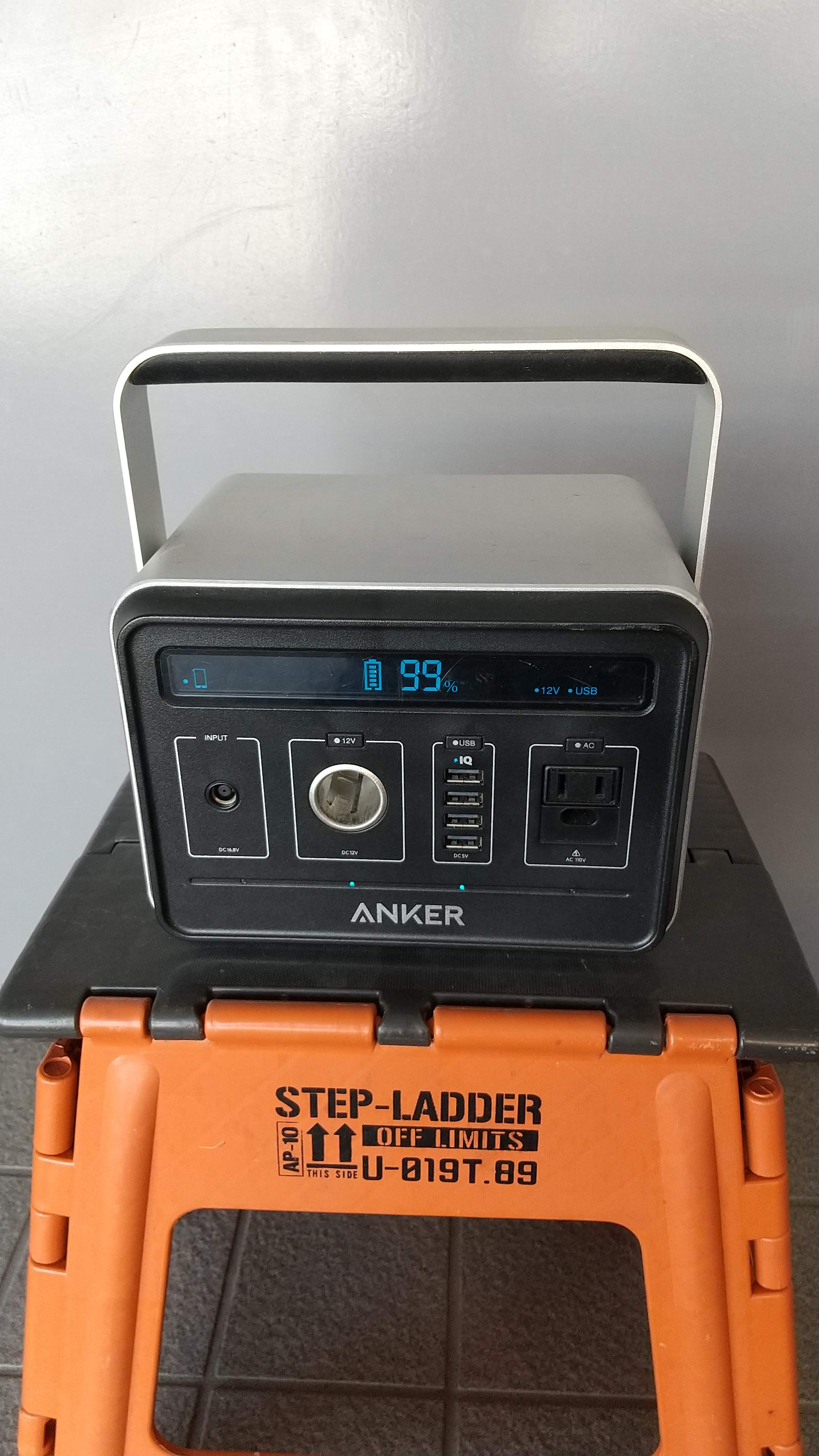 Anker PowerHouse 120,600mAh